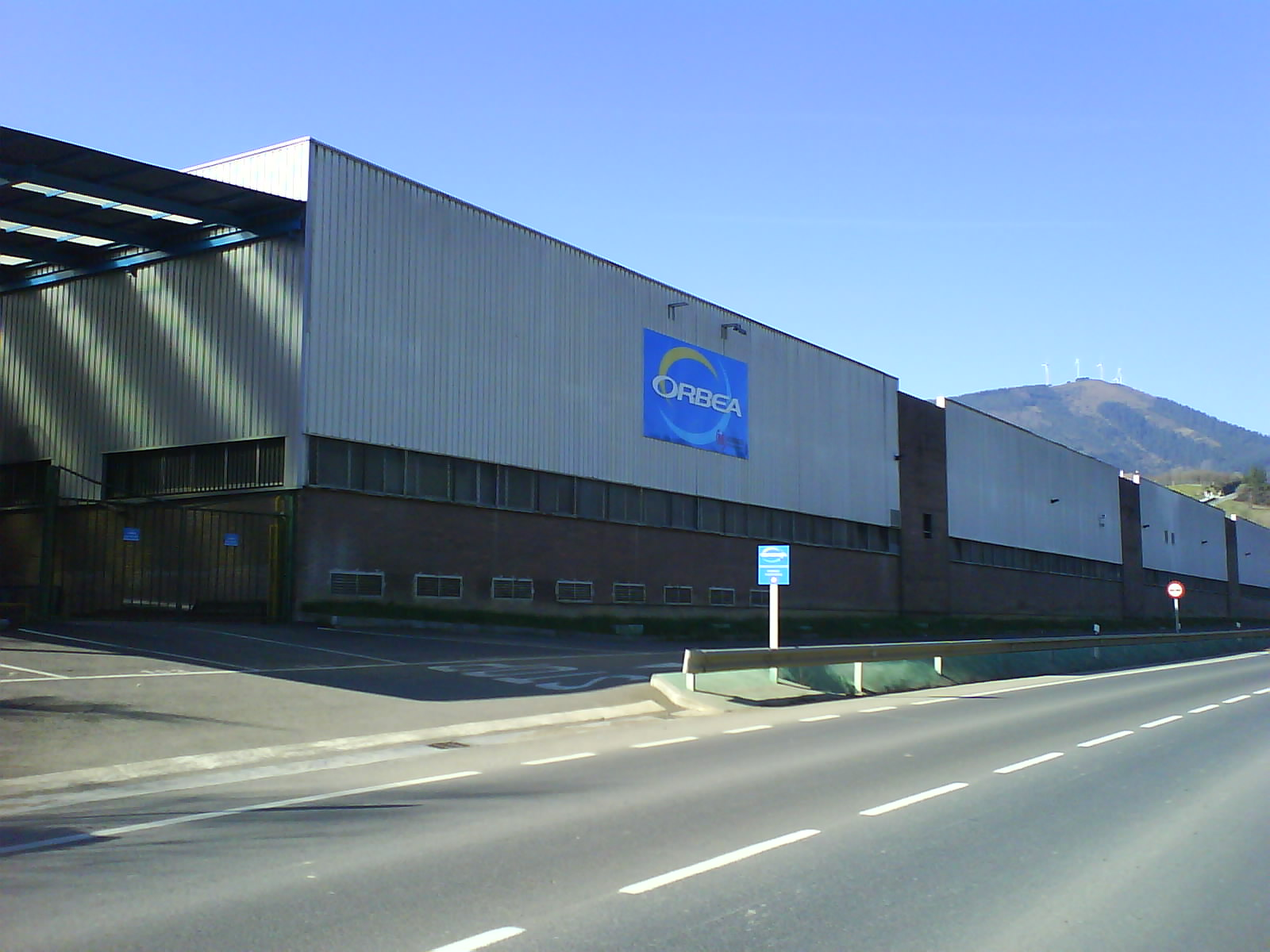 Instalaciones de Bicicletas Orbea en Mallavia, Vizcaya, País Vasco (España).